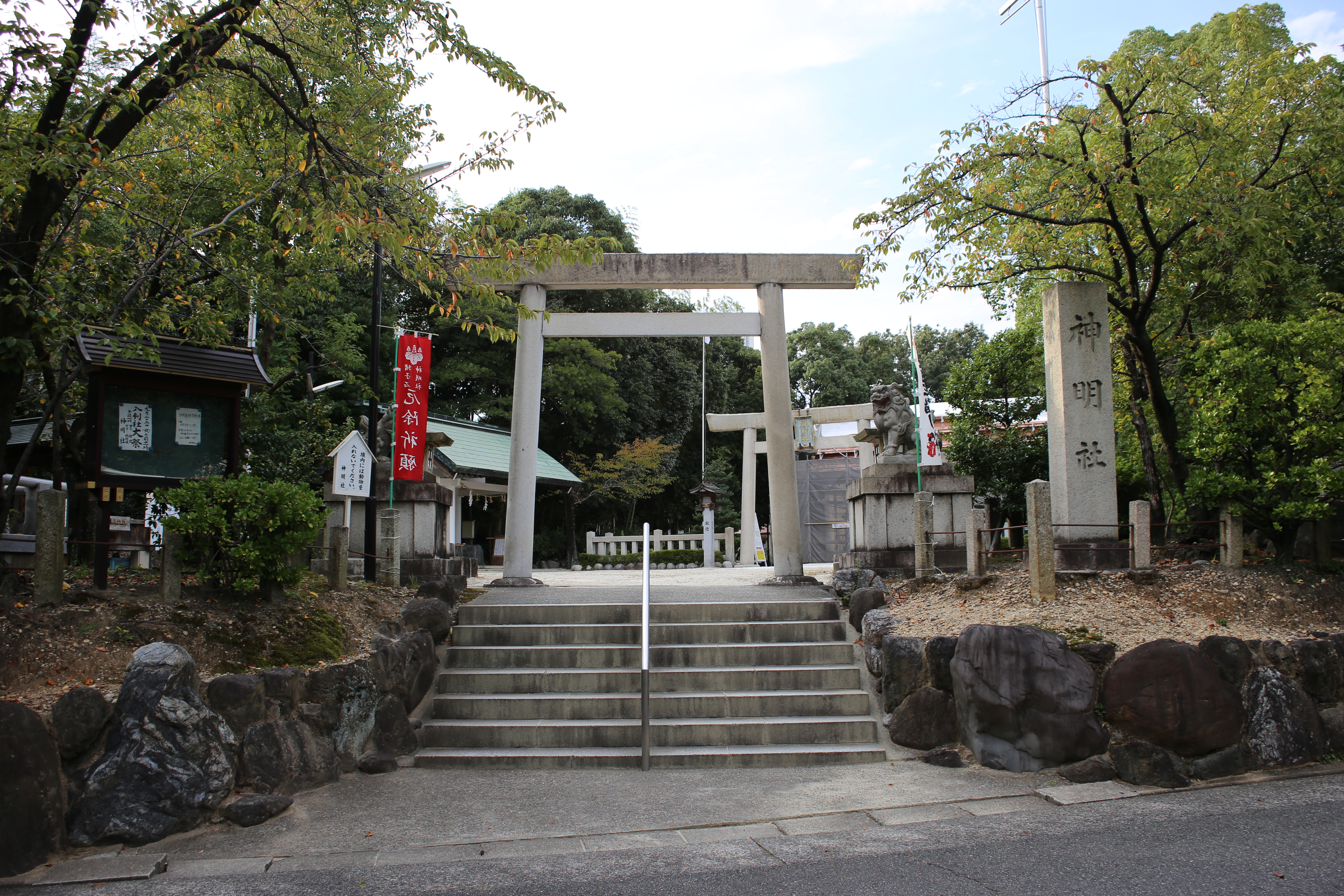 名古屋市名東区神月町の猪子石神明社を東側公道より撮影